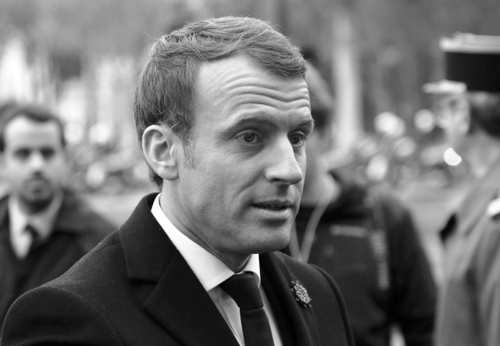 Emmanuel Macron aux cérémonies du 11 novembre 2017 à la statue Clemenceau